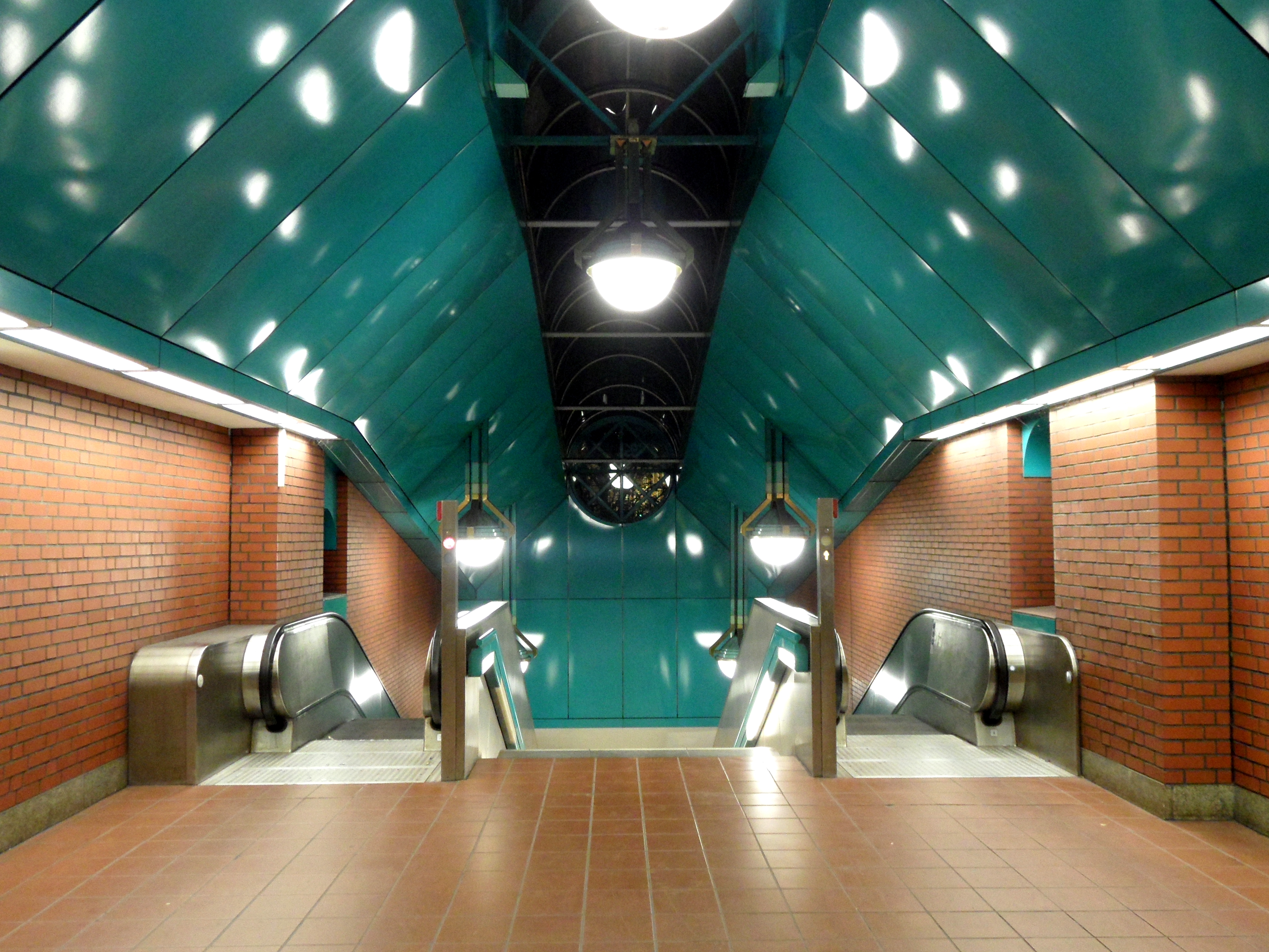 Berlin - U-Bahnhof Rathaus Reinickendorf - Linie U8